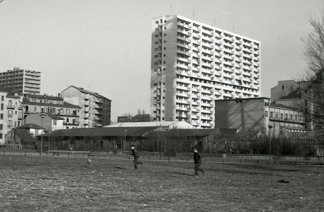 Serie fotografica : Milano, 1963 / Paolo Monti. - Strisce: 4, Fotogrammi complessivi: 24 : Negativo b/n, gelatina bromuro d'argento/ pellicola ; 35 mm. - ((I fotogrammi hanno una doppia numerazione. . - Sul portanegativi: Pentax FP3. - Fonte: Agenda di Paolo Monti: Foto Leica 1 / 1-51 verde, 1-110 nera (1958-1963), presso Archivio Paolo Monti